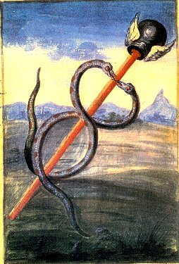 Extrait de l'Alchimie de Flamel, par le Chevalier Denys Molinier "pensionnaire du Roy, amateur de la Science hermétique".